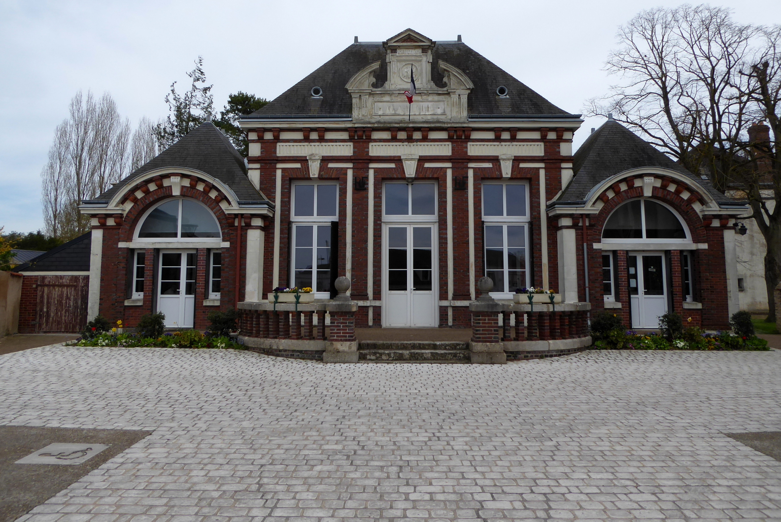 mairie de Bailleau-le-Pin, Eure-et-Loir (France).